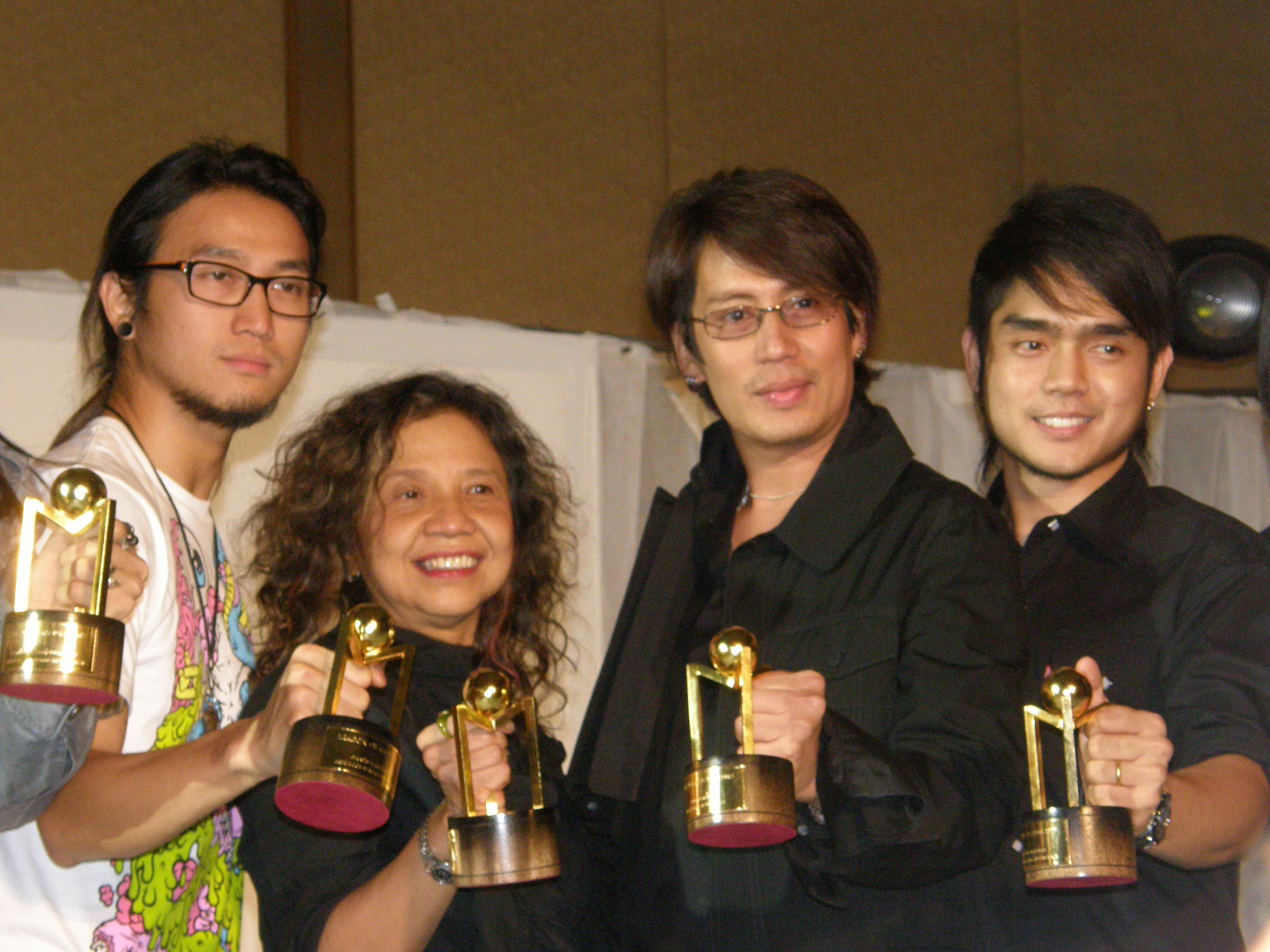 ธงไชย แมคอินไตย์ รับรางวัลสีสันอวอร์ด ปี 2551 เมื่อวันที่ 19 มีนาคม 2551 และร่วมถ่ายภาพหมู่กับศิลปินที่ได้รับรางวัล